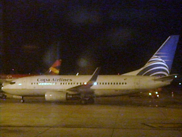 737 de copa airlines en Bogota